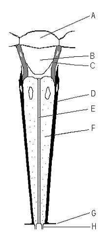 Schéma d'une ommatidie (ommatidium).A – cornea, B – crystalline cone, C & D – pigment cells, E – rhabdom, F – Retinula cells, G – membrana fenestrata, H – optic nerve